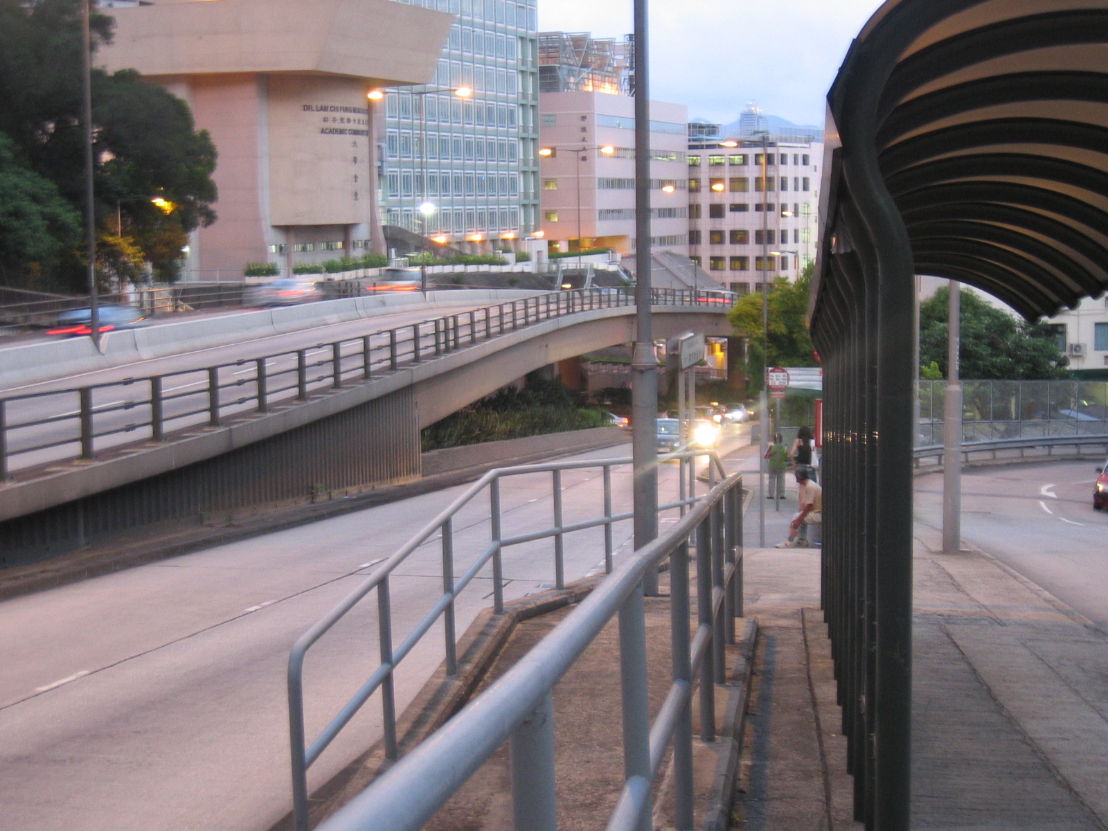 Moonbeam Terrace Bus Stop, Kowloon Tong, Hong Kong